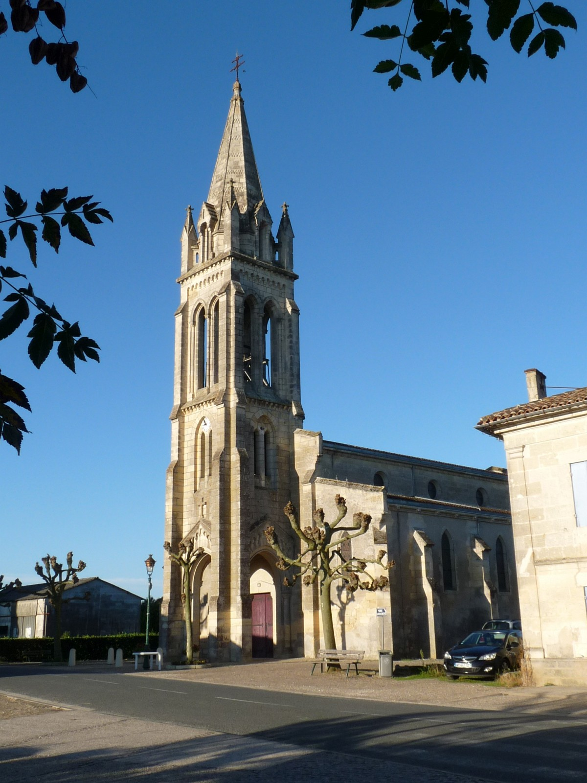 Eglise de Maransin, Gironde, France